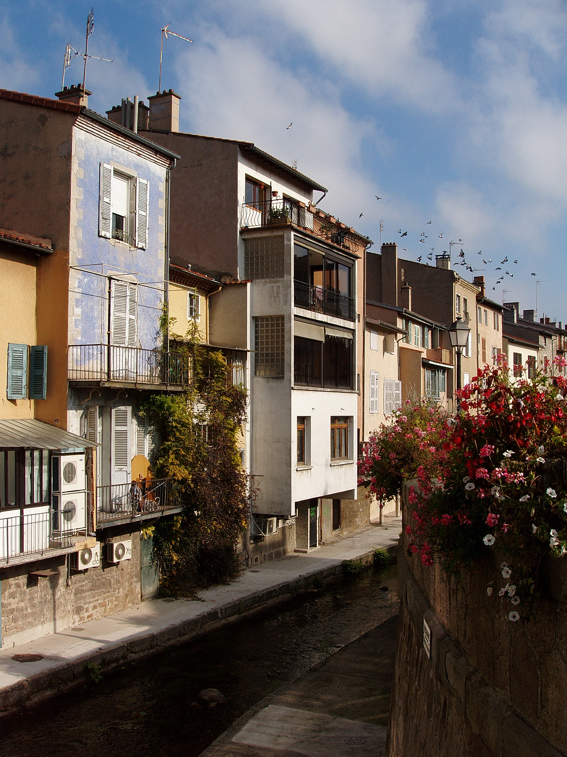 Montbrison